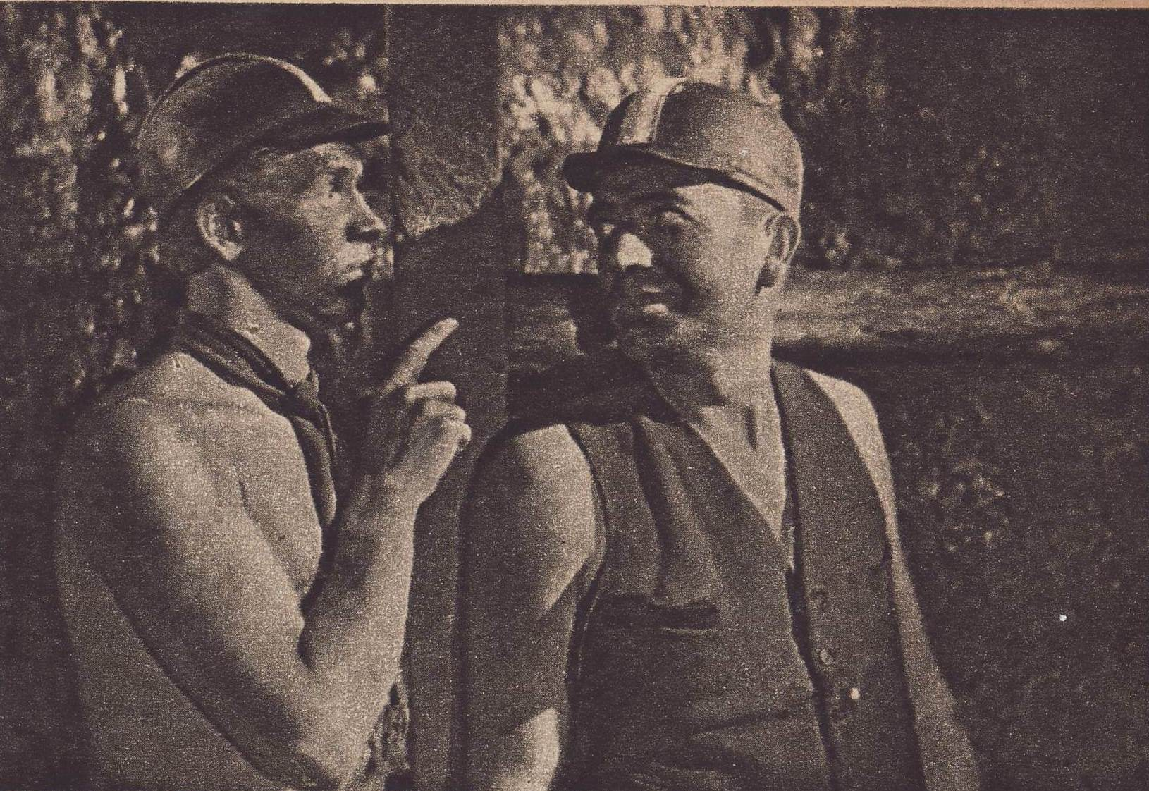 Kręcenie filmu Stalowe serca 600 m pod ziemia: Tadeusz Łomnicki i Stanisław Winczewski jako górnicy